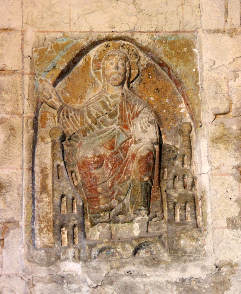 Relief de Christ en majesté dans le porche de l'église Sainte-Radegonde à Poitiers.